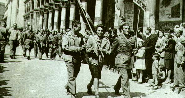 Manifestazione di partigiani per le strade di Milano subito dopo la liberazione - foto storica ampiamente diffusa nel web